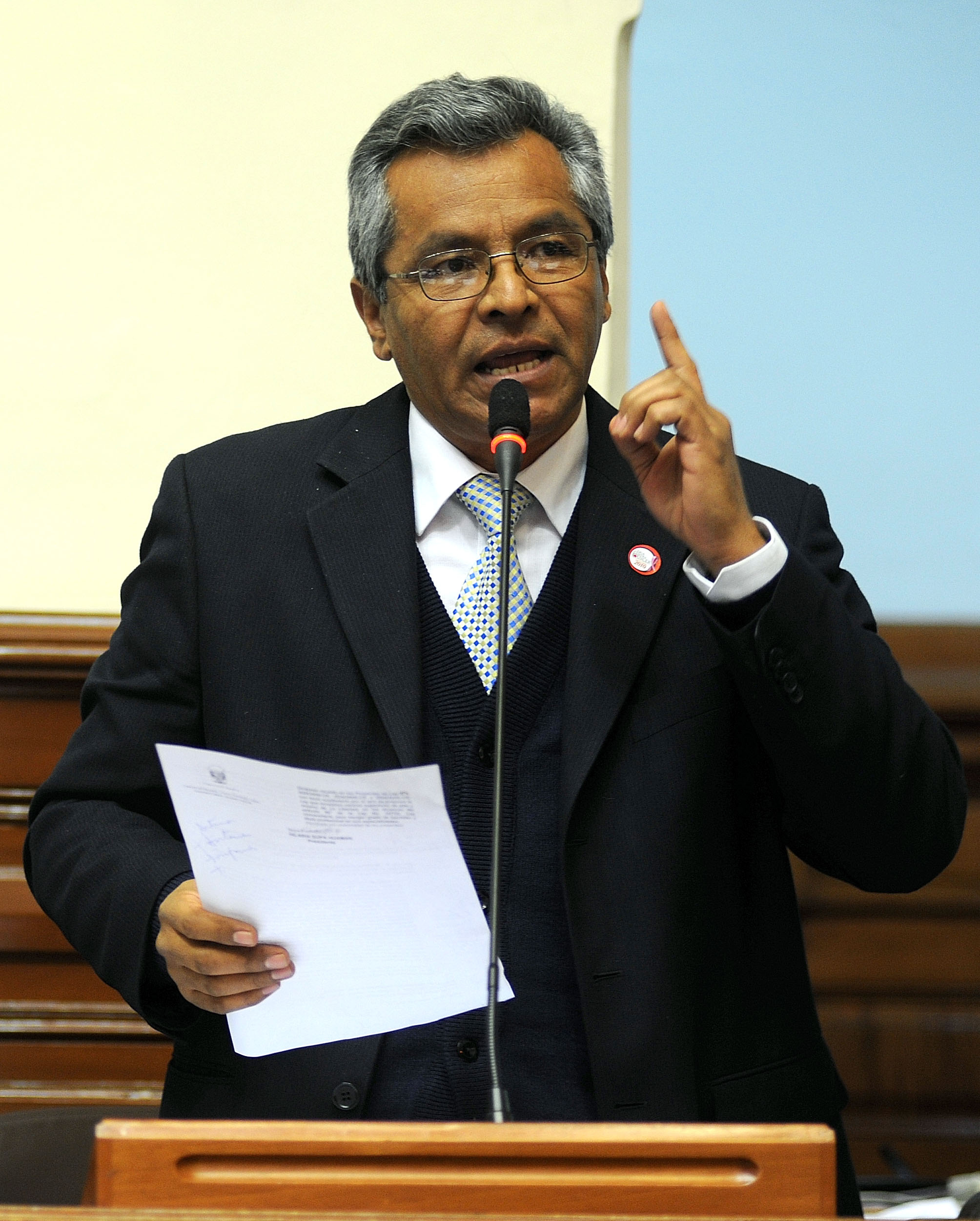 El legislador Washington Zeballos Gámez expresa su posición en el debate parlamentario realizado esta tarde por el Pleno congres